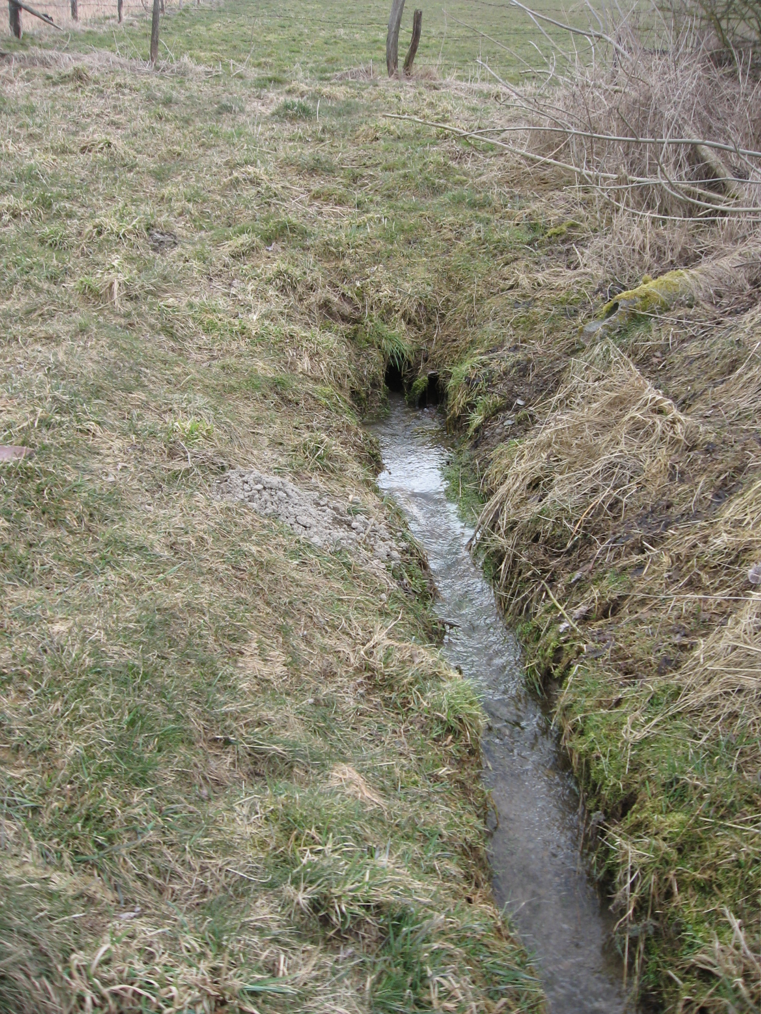 Austritt des Baches Wehrsiepen aus Rohr im Landschaftsschutzgebiet "Werde, Selkentroper Bach und Wehrsiepen zwischen Werpe und Selkentrop".